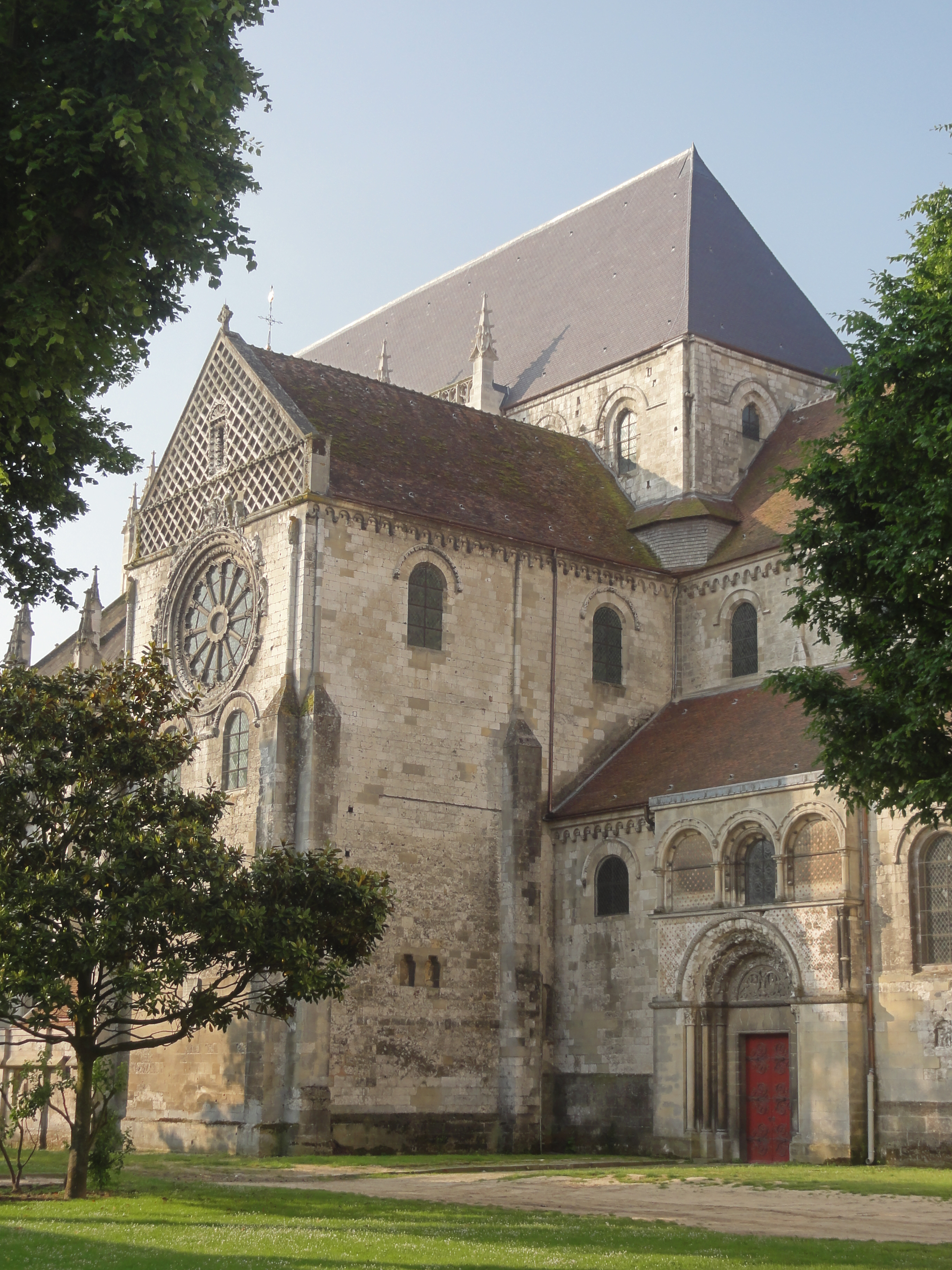 Croisillon nord, vue depuis le nord-ouest.